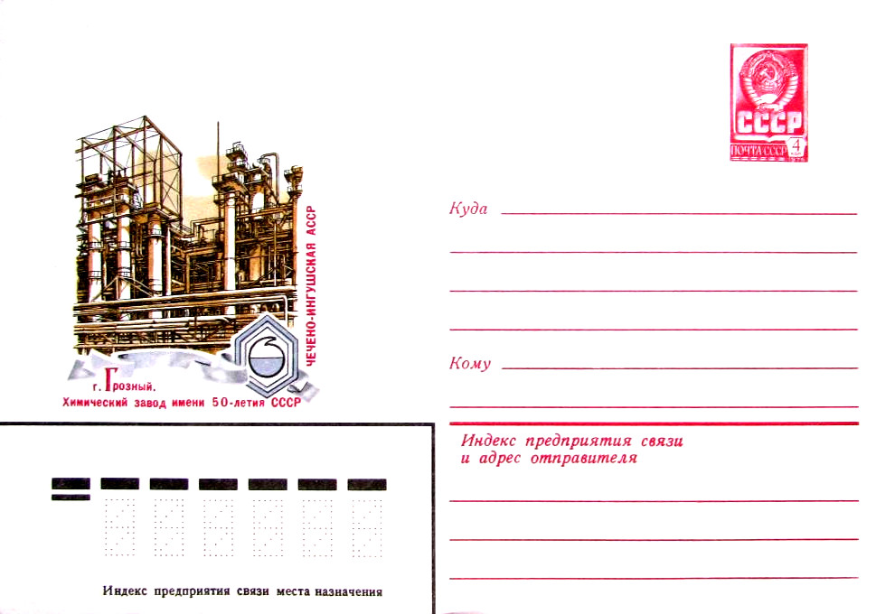 Почтовый конверт СССР. 9 октябрь 1979 года.